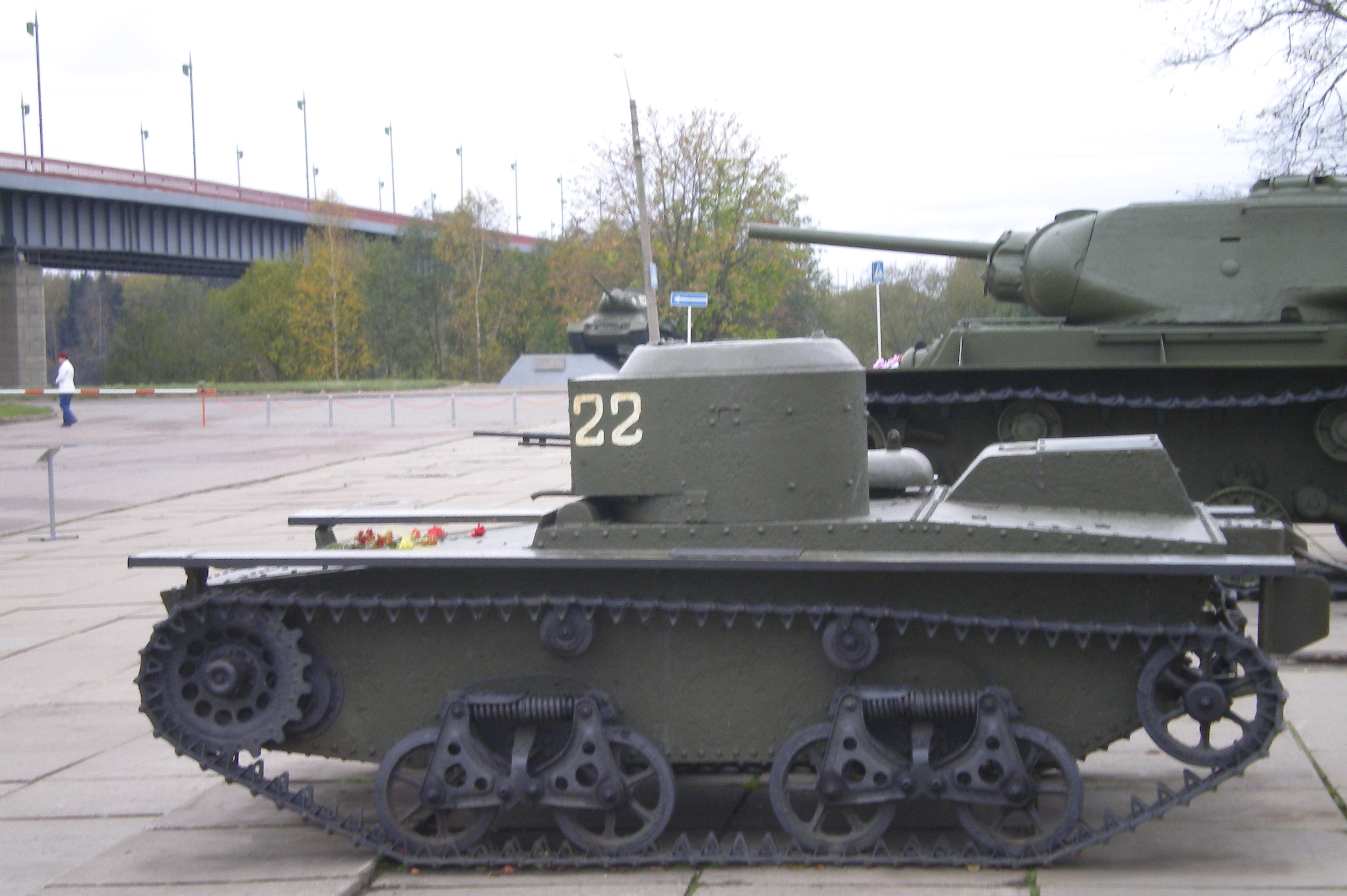 Танк Т-38. Вид слева. Диорама «Прорыв блокады Ленинграда». Экспозиция военной техники периода 1941–1944 годов под открытым небом.